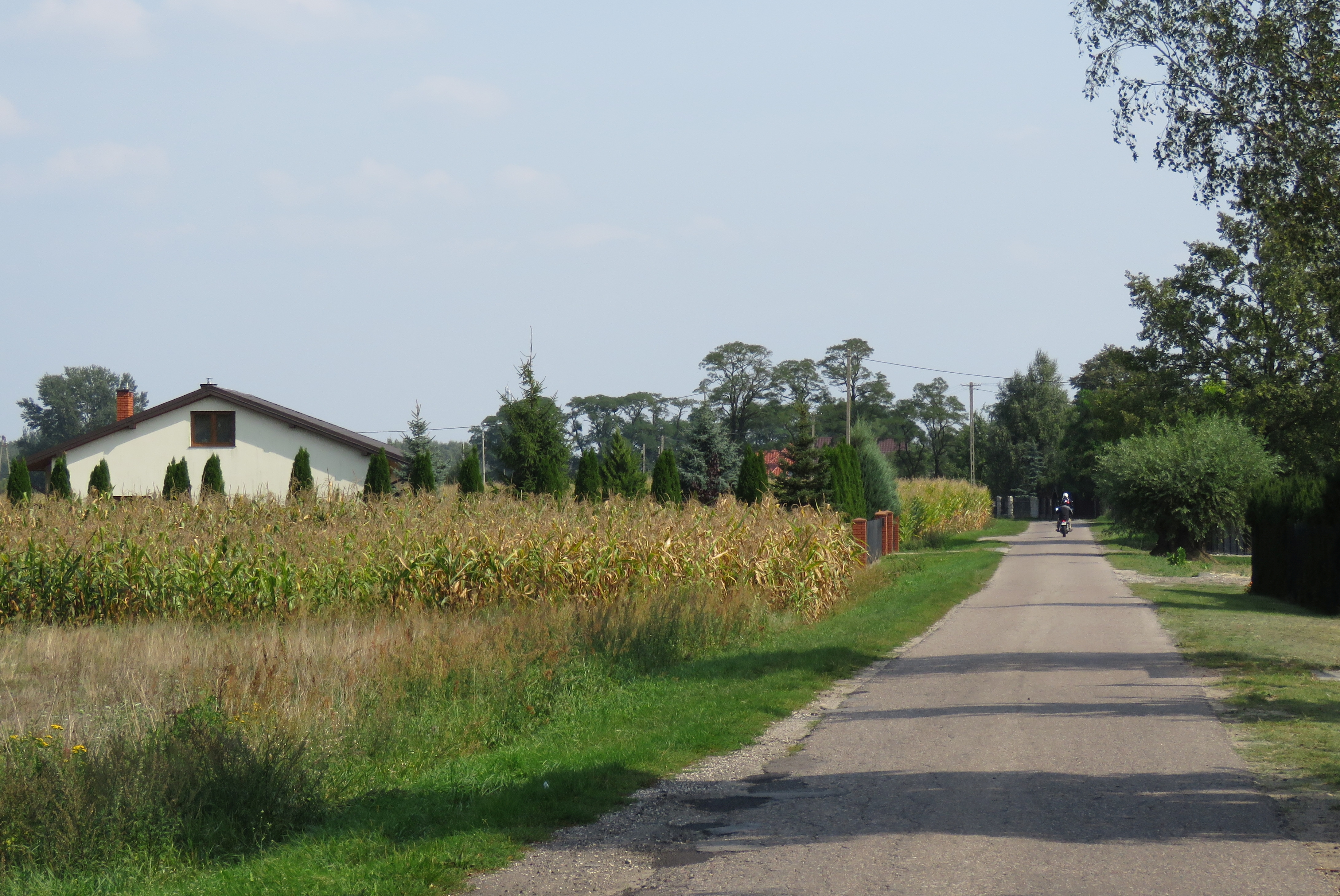 Podkampinos, gm. Kampinos